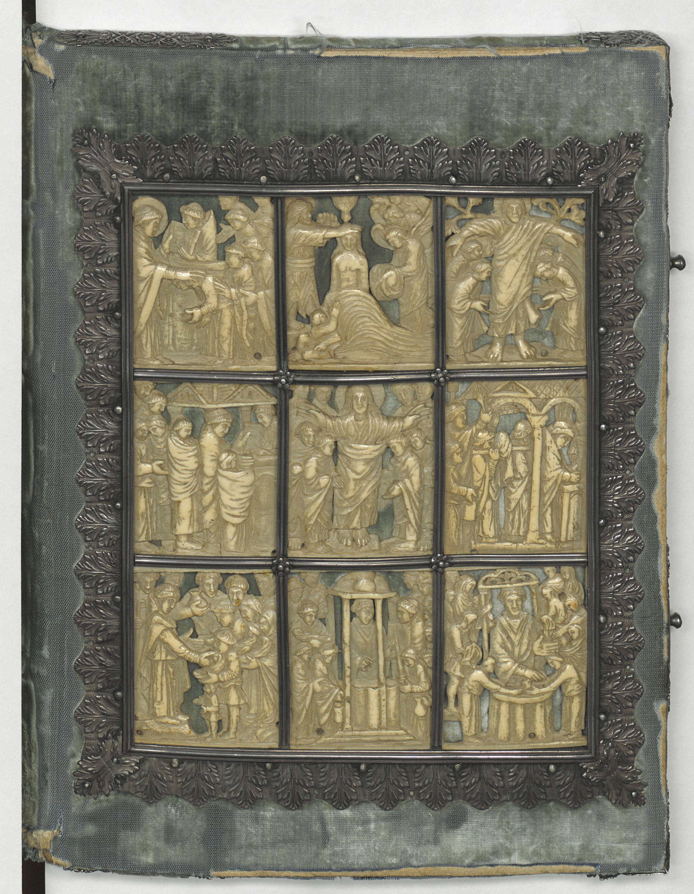 Sacramentaire de Drogon, plat supérieur de la reliure du manuscrit.